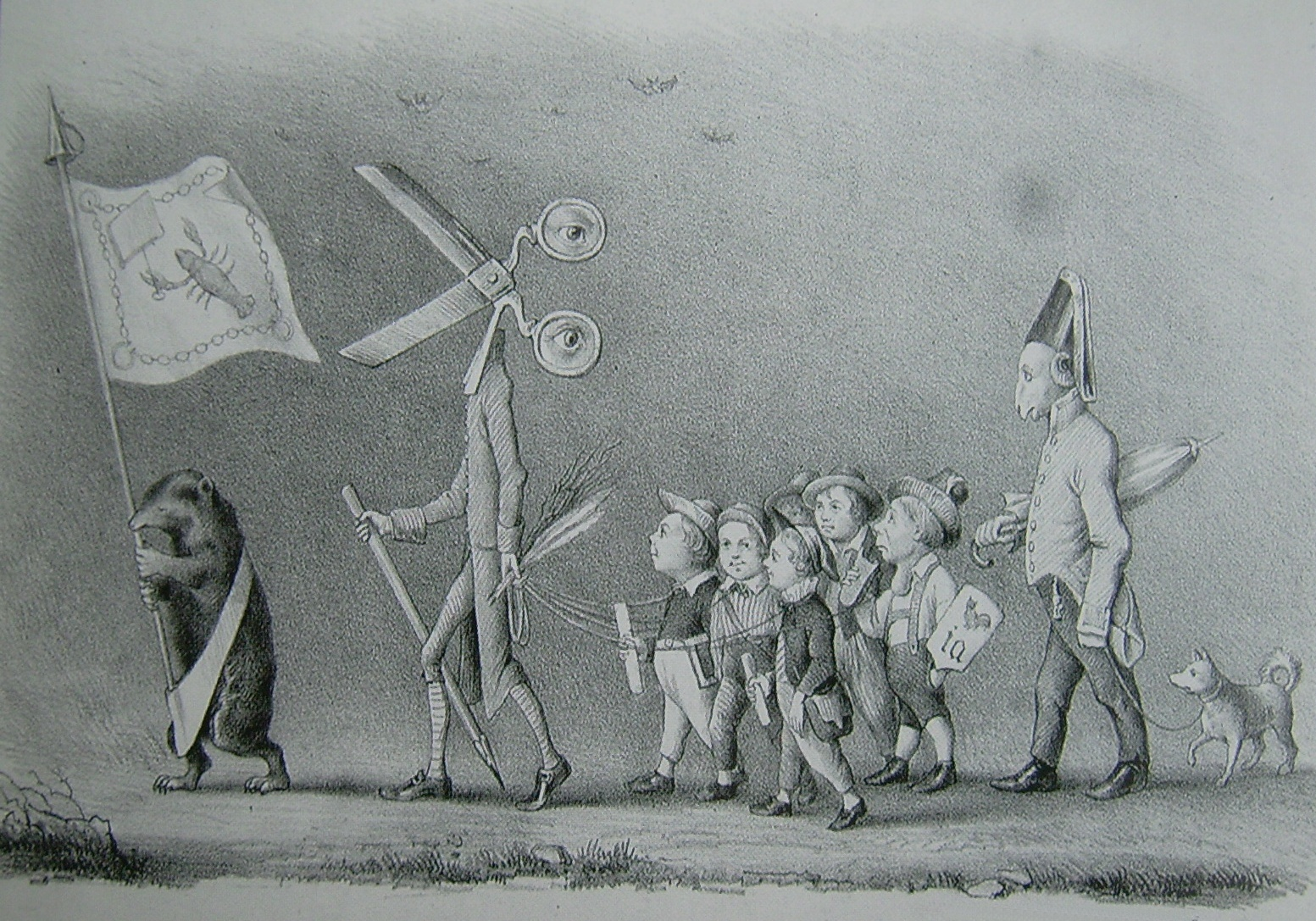 In der Karikatur Die gute Presse von 1847 aus unbekannter Feder steht der Krebs für Rückschritt, der Spiegel des Krebses für die Rückwärtsgewandtheit, der Maulwurf für Blindheit, Kerzenlöscher für Dunkelheit, die Schere und Stift für Zensur, die Rute für Drangsal, die Augen für Überwachung, die Kinder für den bevormundeten Bürger, der Schafskopfspolizist für die Dummheit der Staatsmacht und der Spitz für die Spitzelei. Die Karikatur erschien in der Zeitschrift Leuchtturm. Die Bildunterschrift lautet: Süße heilige Censur; laß uns gehn auf deiner Spur; Leite uns an deiner Hand Kindern gleich; am Gängelband!